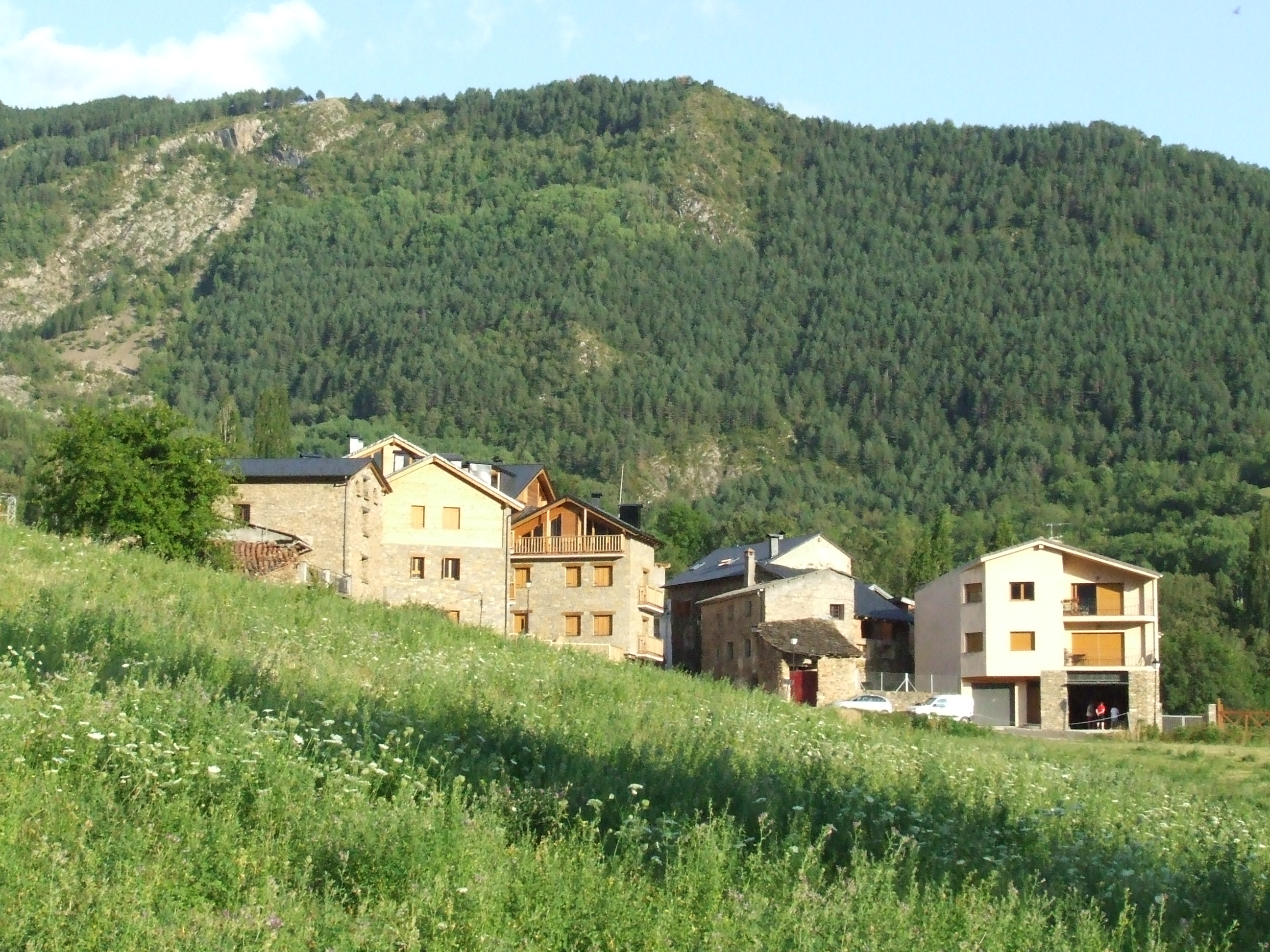 Paüls de Flamisell (Mont-ros, la Torre de Cabdella, Pallars Jussà)